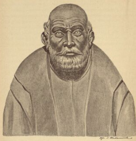 Кампіан Павел